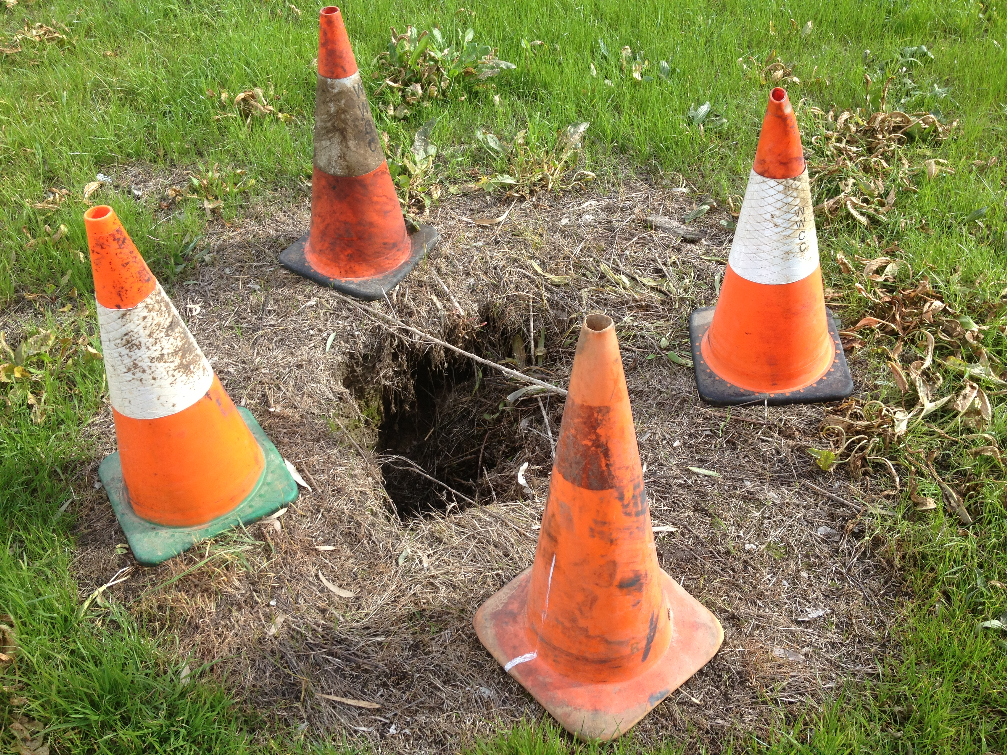 Sink hole in Cabarita Park.